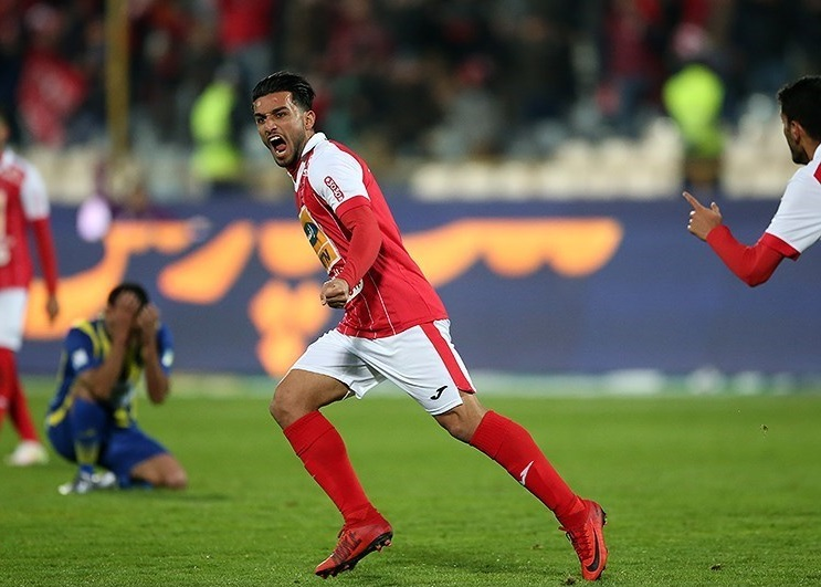 سیامک نعمتی در مسابقه پرسپولیس و گسترش فولاد در ورزشگاه آزادی تهران